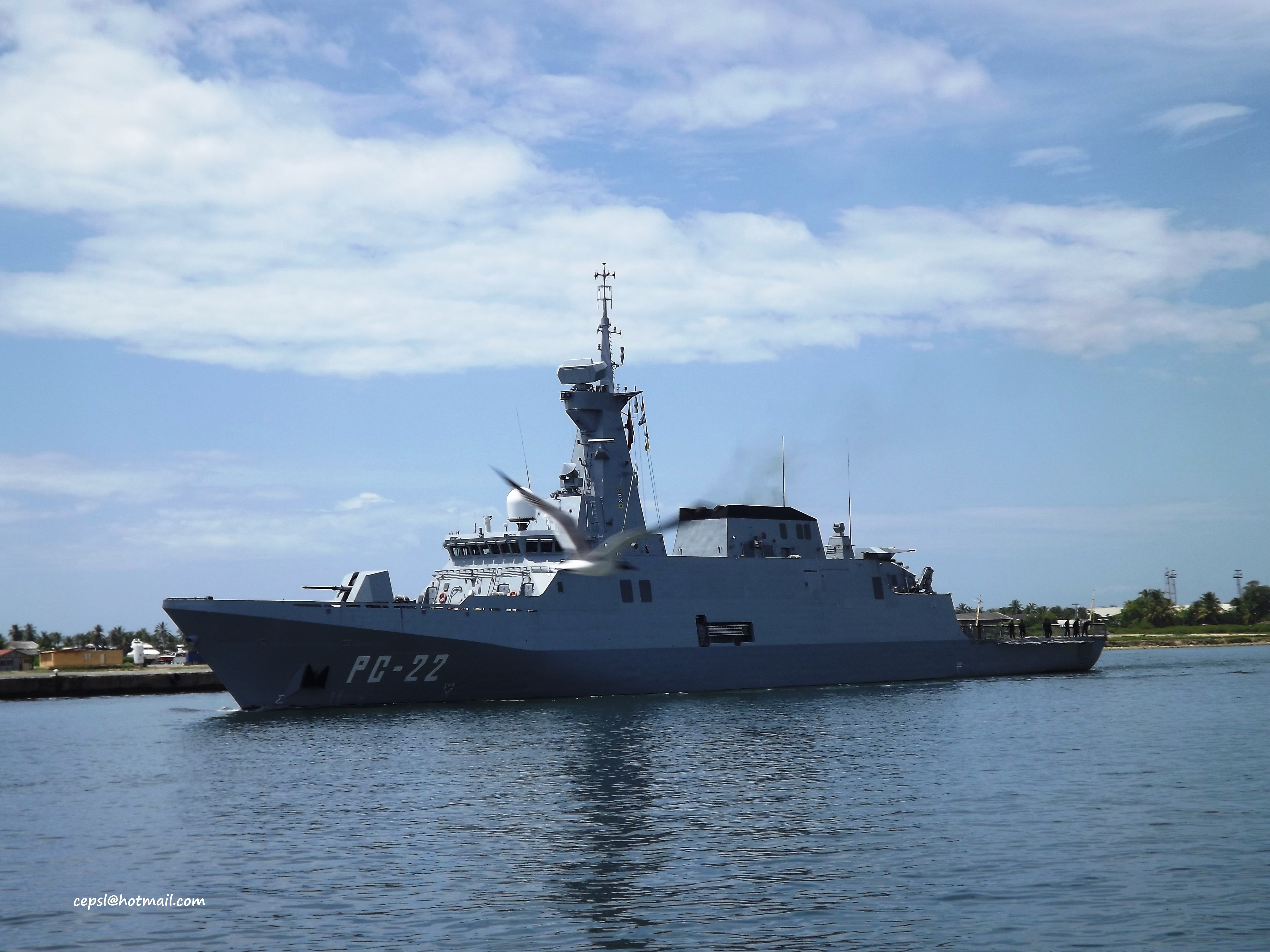 Patrullero Oceánico PC-22 Warao Clase Guaiquerí POVZEE Julio 2012 Día de la Armada Nacional de Venezuela